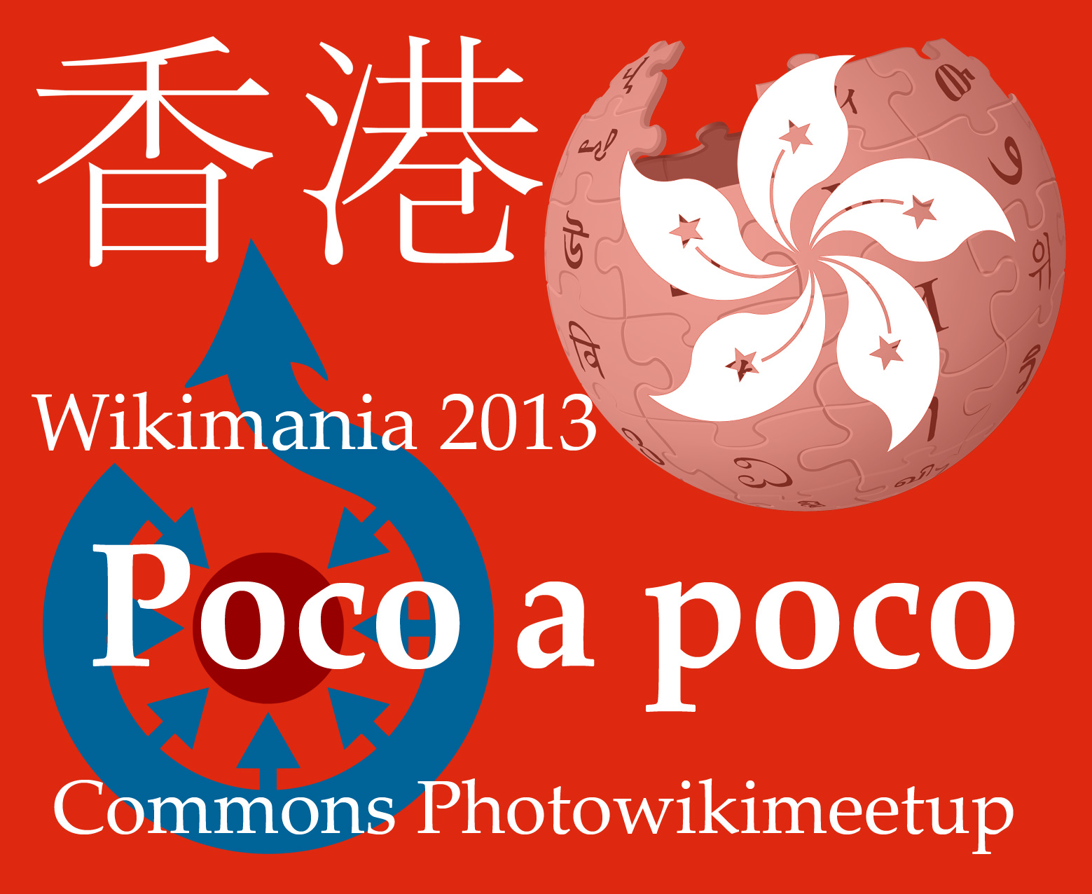 Namensschildchen für Fotowikimeetup in Hong Kong